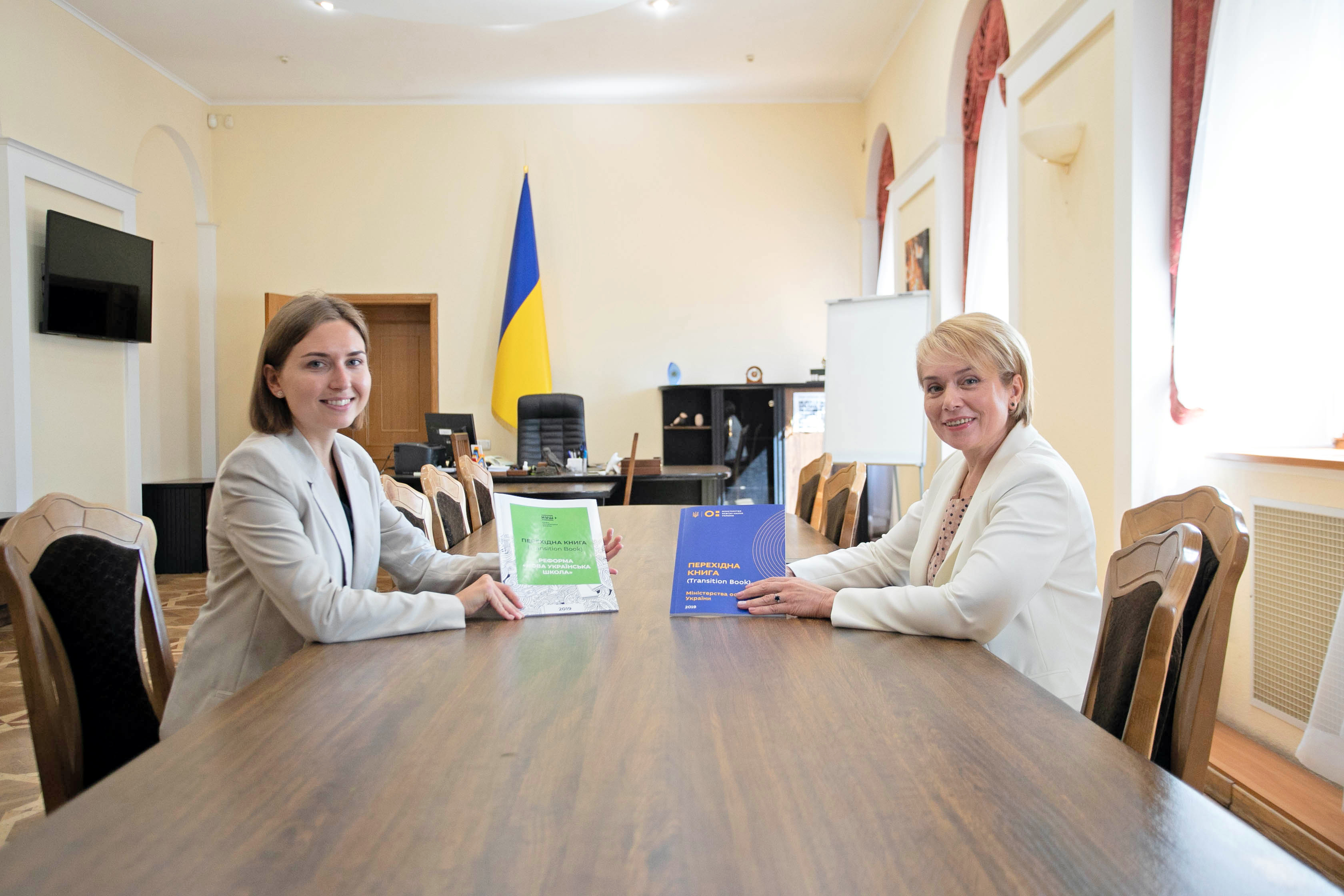 Лілія Гриневич офіційно передала владу та перехідні книги 11-му Міністру освіти і науки Ганні Новосад